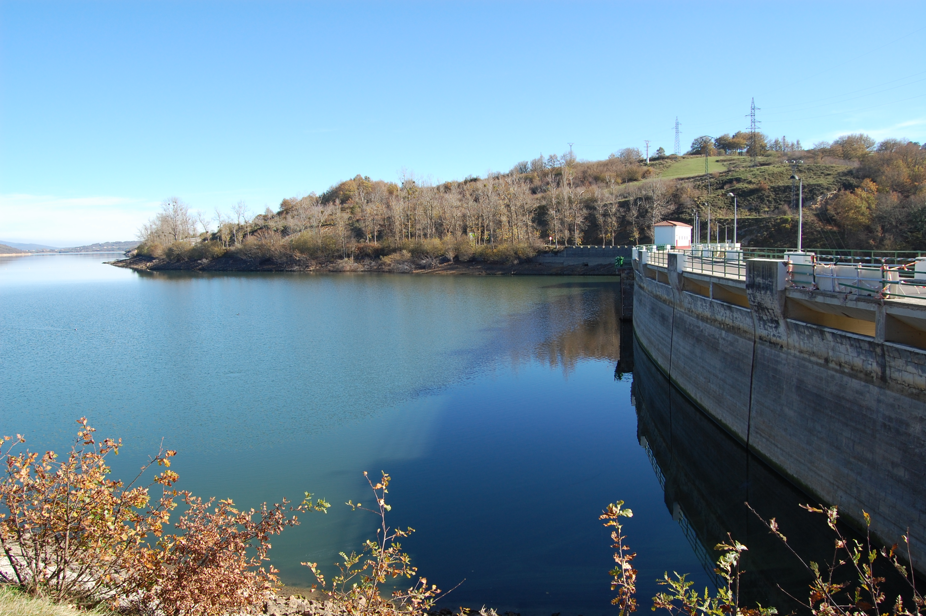 Las Rozas de Valdearroyo